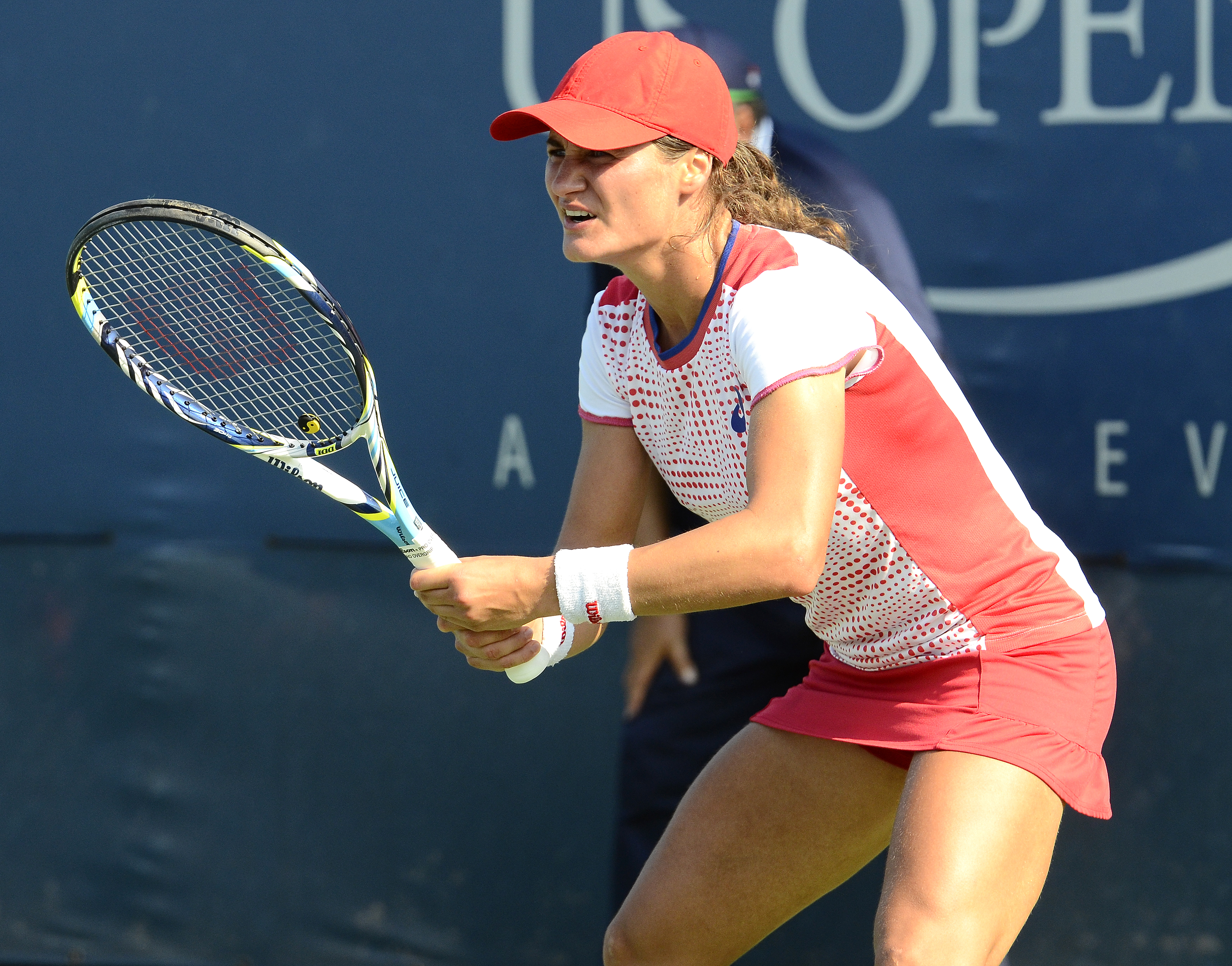 August 26, 2014 Queens, NY Monica Niculescu (ROU) def. Yaroslava Shvedova (KAZ)